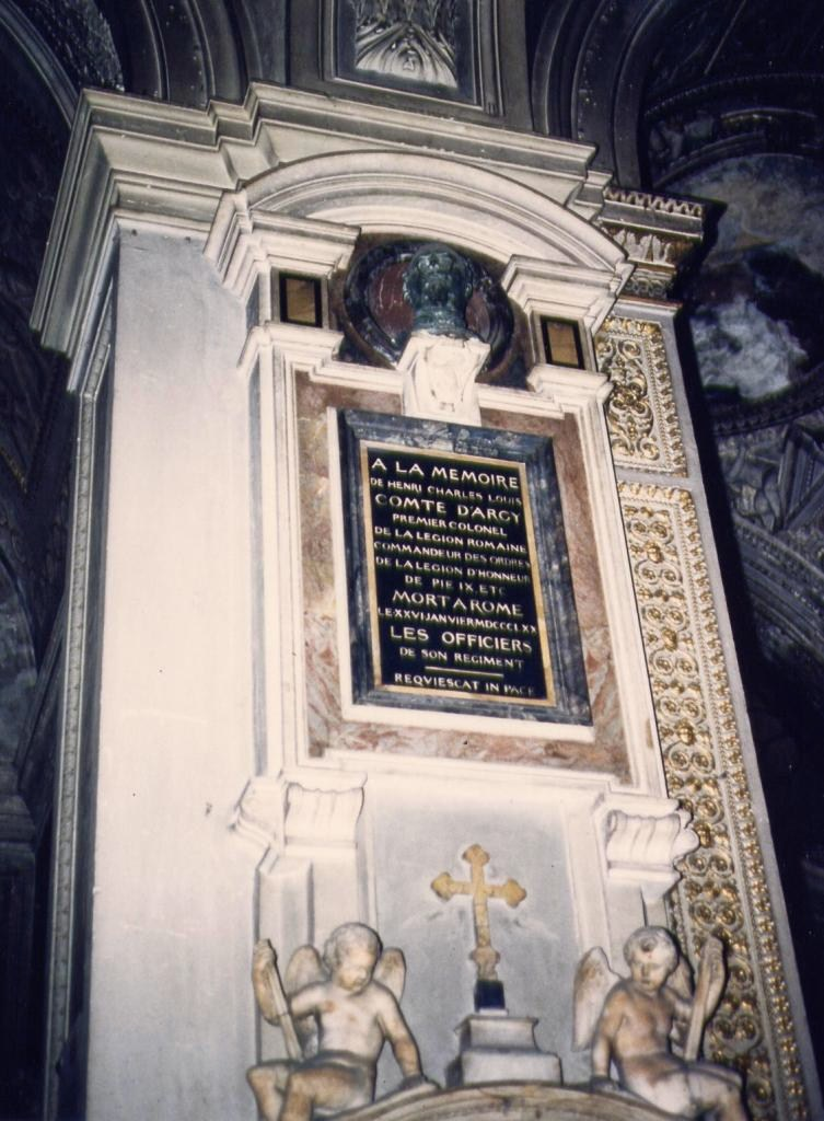 Monument au Colonel Comte Charles d'Argy - Saint Louis des Français - Rome